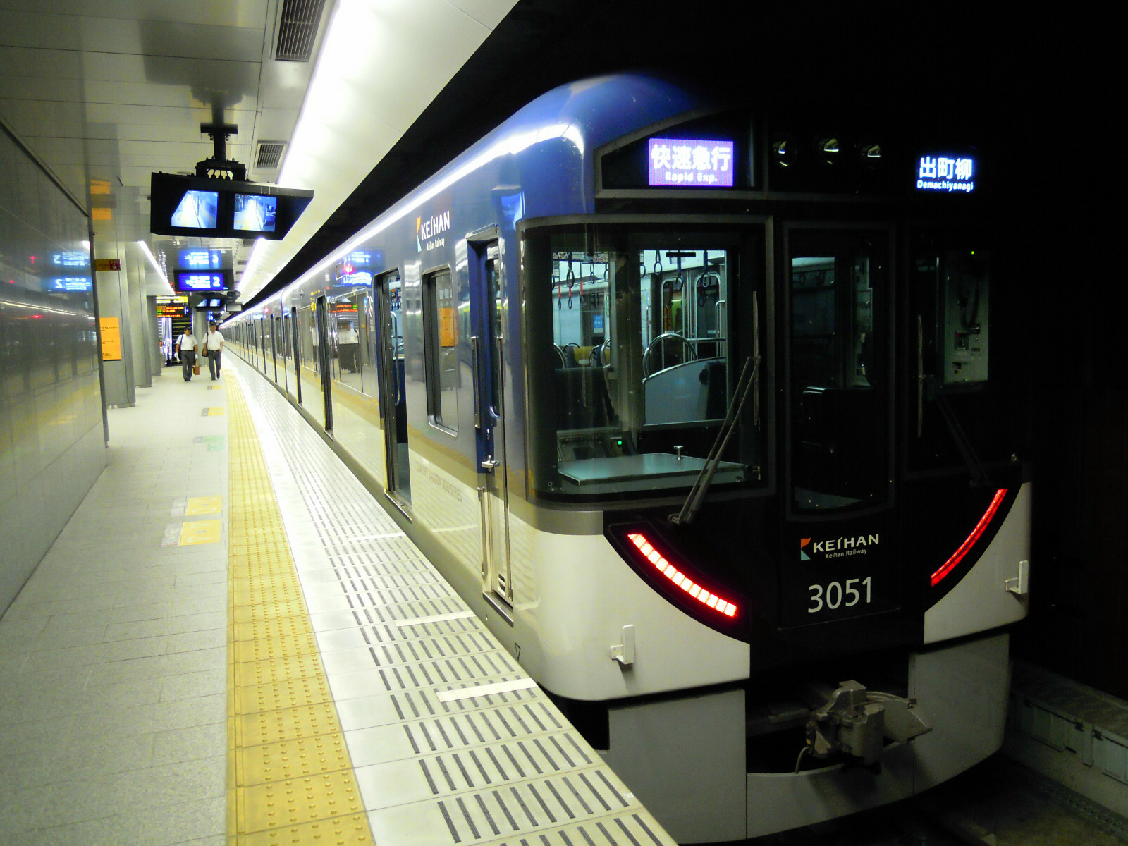 Keihan Nakanoshima station platform